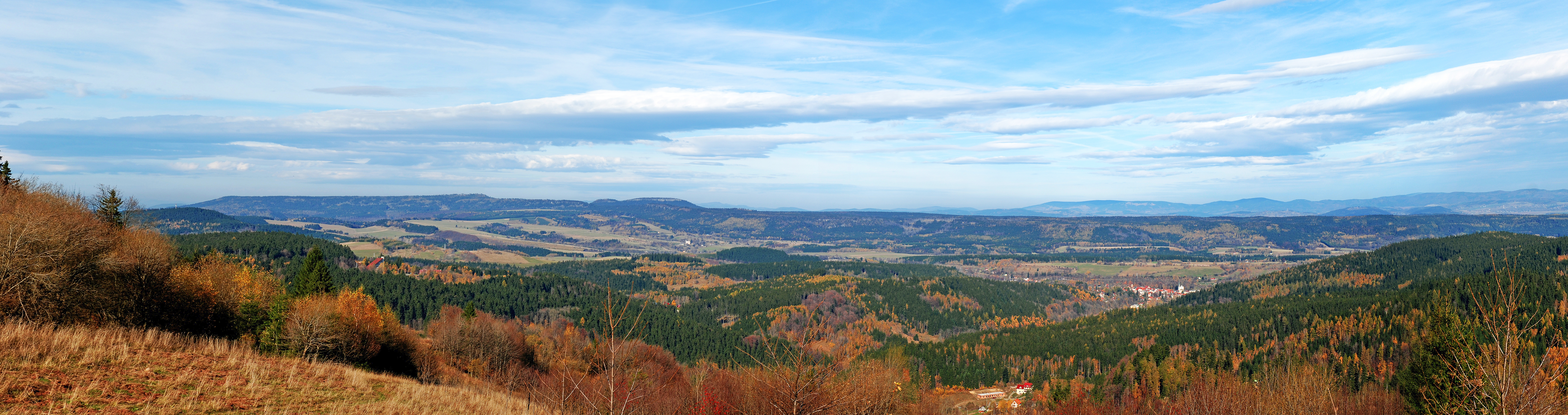 Panorama Ziemi Kłodzkiej z Zieleńca